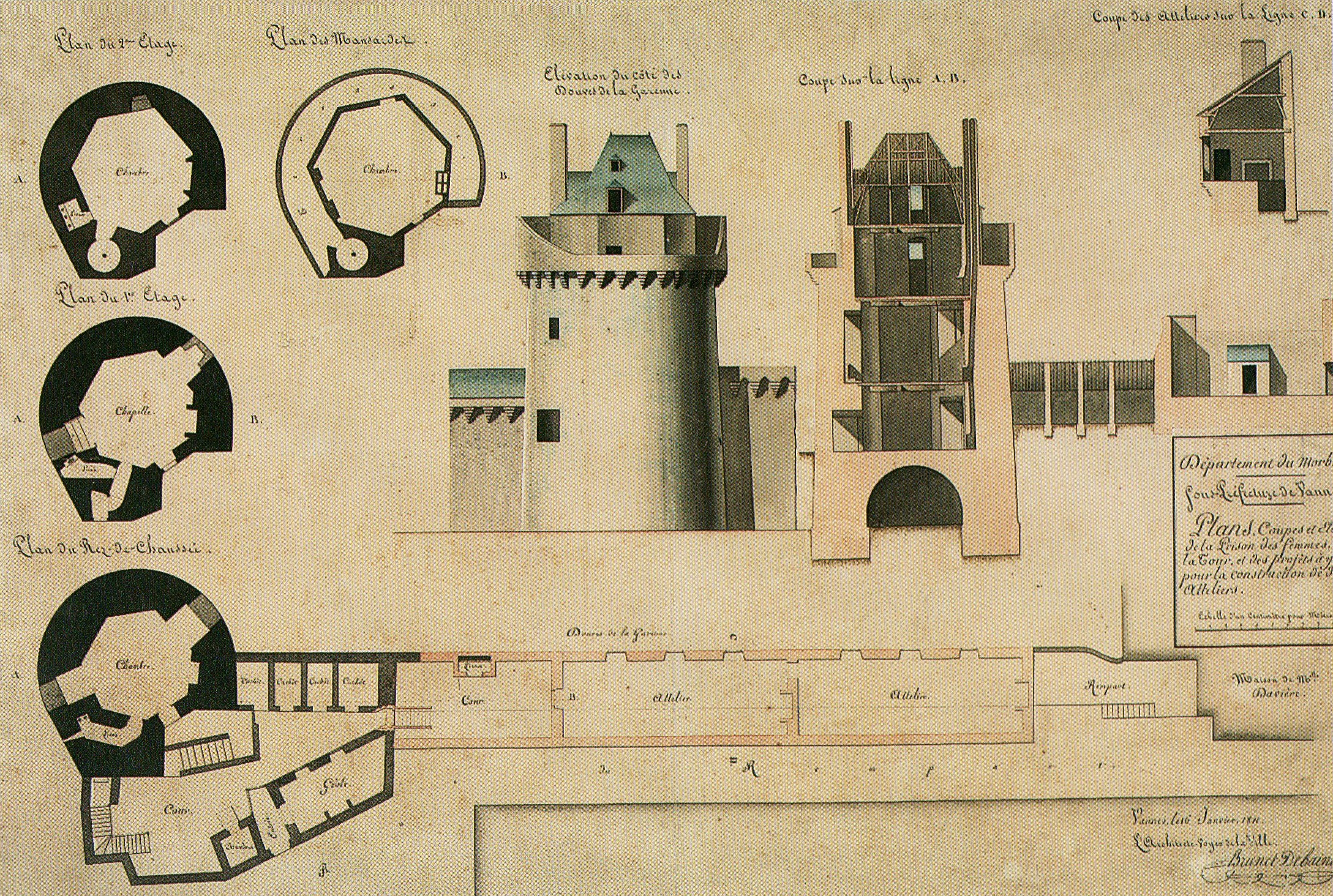 Coupe de Tour du Connétable de Vannes - document dans son intégralité